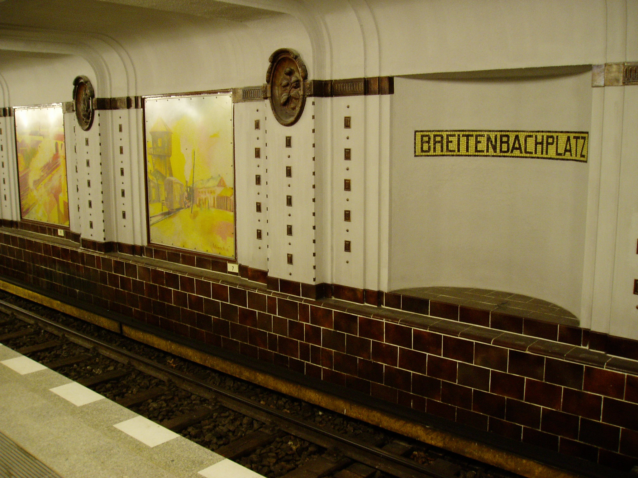 Berlin U-Bahnhof Breitenbachplatz, Bahnsteig